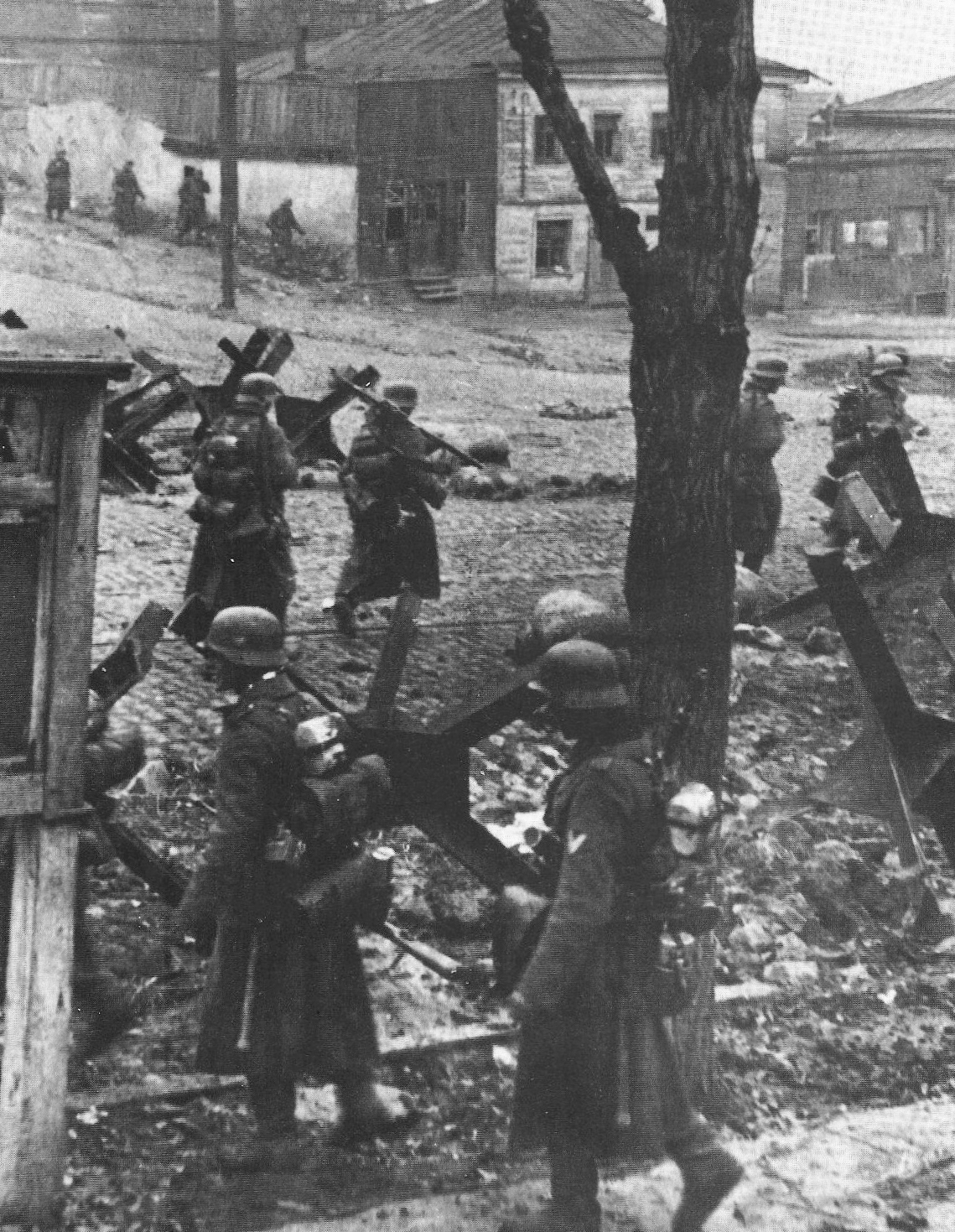 Angehörige der 57. Infanterie-Division in Charkow (Russland), während der Operation "Barbaross".